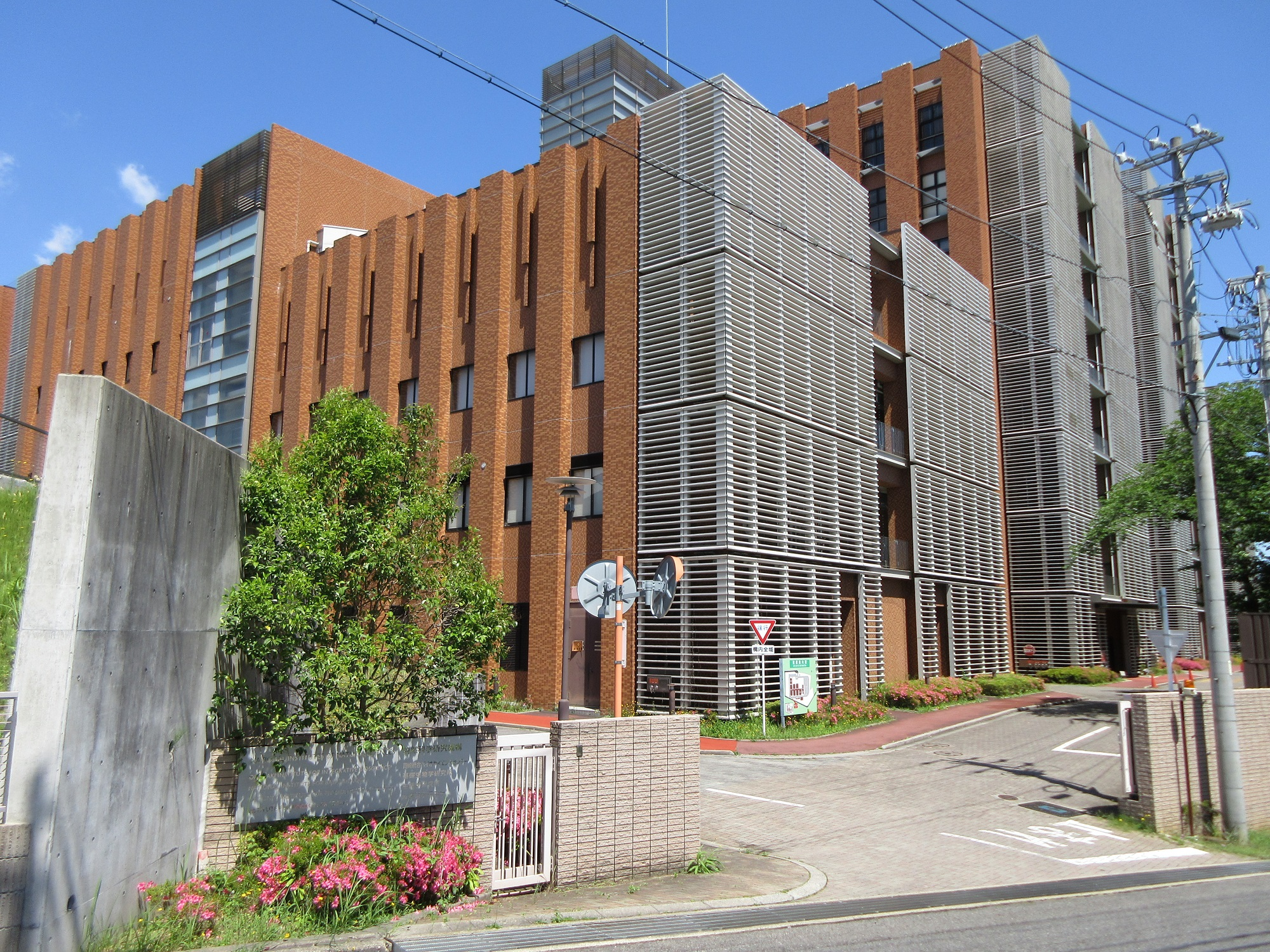 自然科学研究機構（愛知県岡崎市）